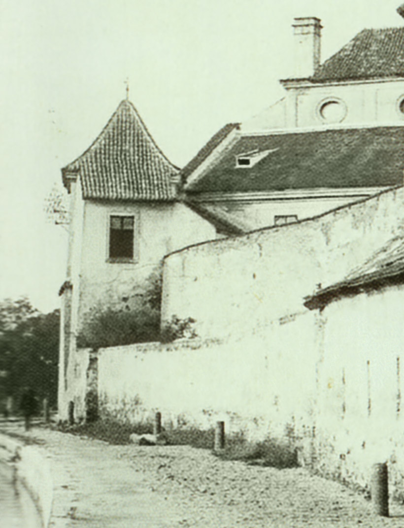 Zaniklá věž Pergula na Zátkově nábřeží